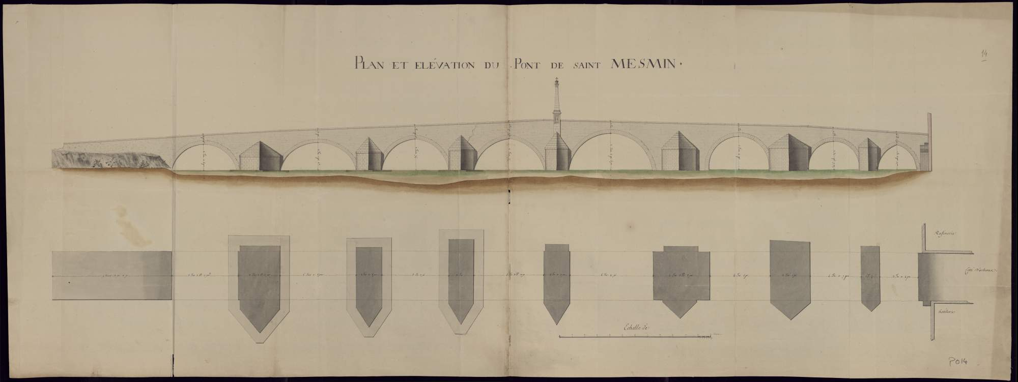 Atlas de Trudaine pour la généralité d'Orléans. N° 292. Généralité d'Orléans n° 3. Grande route de Paris en Espagne depuis Orléans jusqu'au Hautes-Veuves. Mémoire relatif aux ponts. (Loiret, Loir-et-Cher). Route n° 172 de Blois aux Hautes-Veuves. Plan et élévation du pont de Saint-Mesmin. Profil, plan coté.